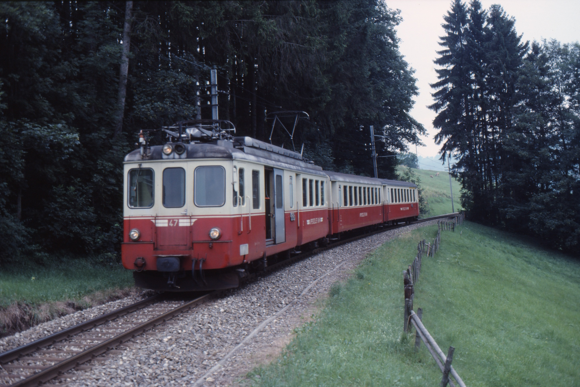 Appenzeller Bahn BDe 4/4 47 near Appenzell